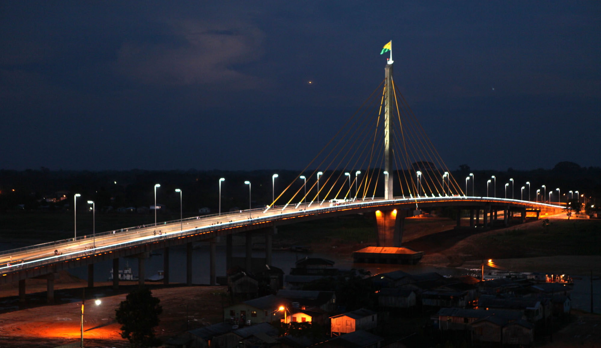 Ponte sobre o rio Juruá em Cruzeiro do Sul